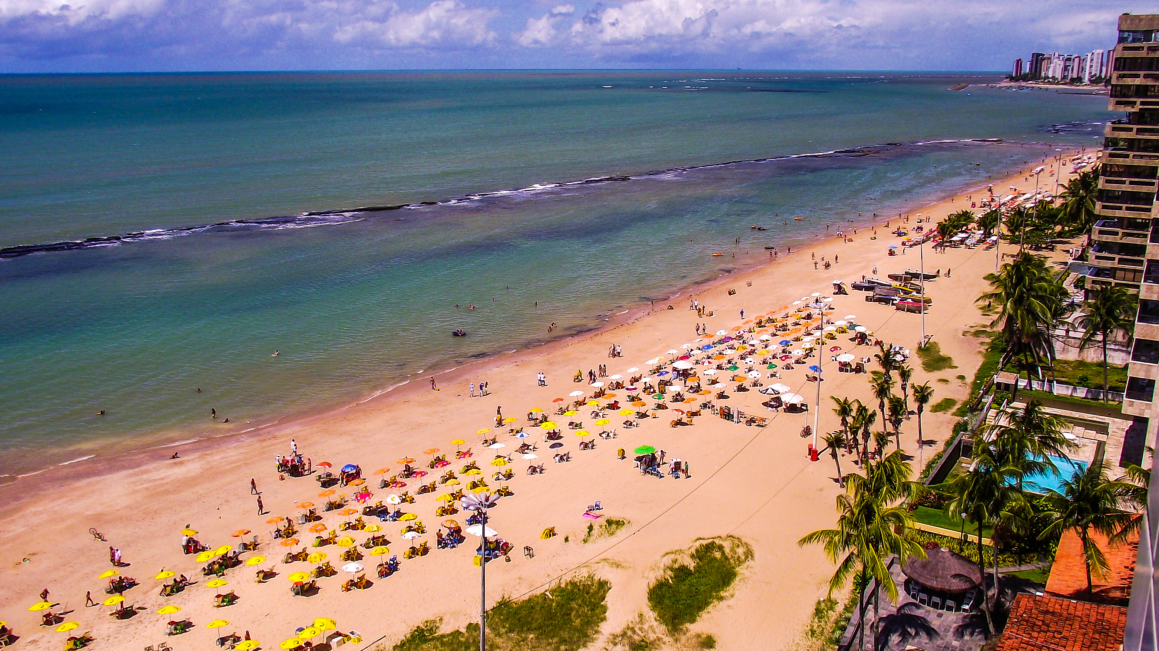 Vista da Praia de Piedade, em Jaboatão de Guararapes